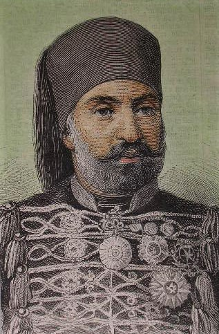 Mohammed es Sadock Pascha Bey, Regent des Königreichs Tunis, 1877, teilkolorierter Holzstich, ca. 15 x 12 cm